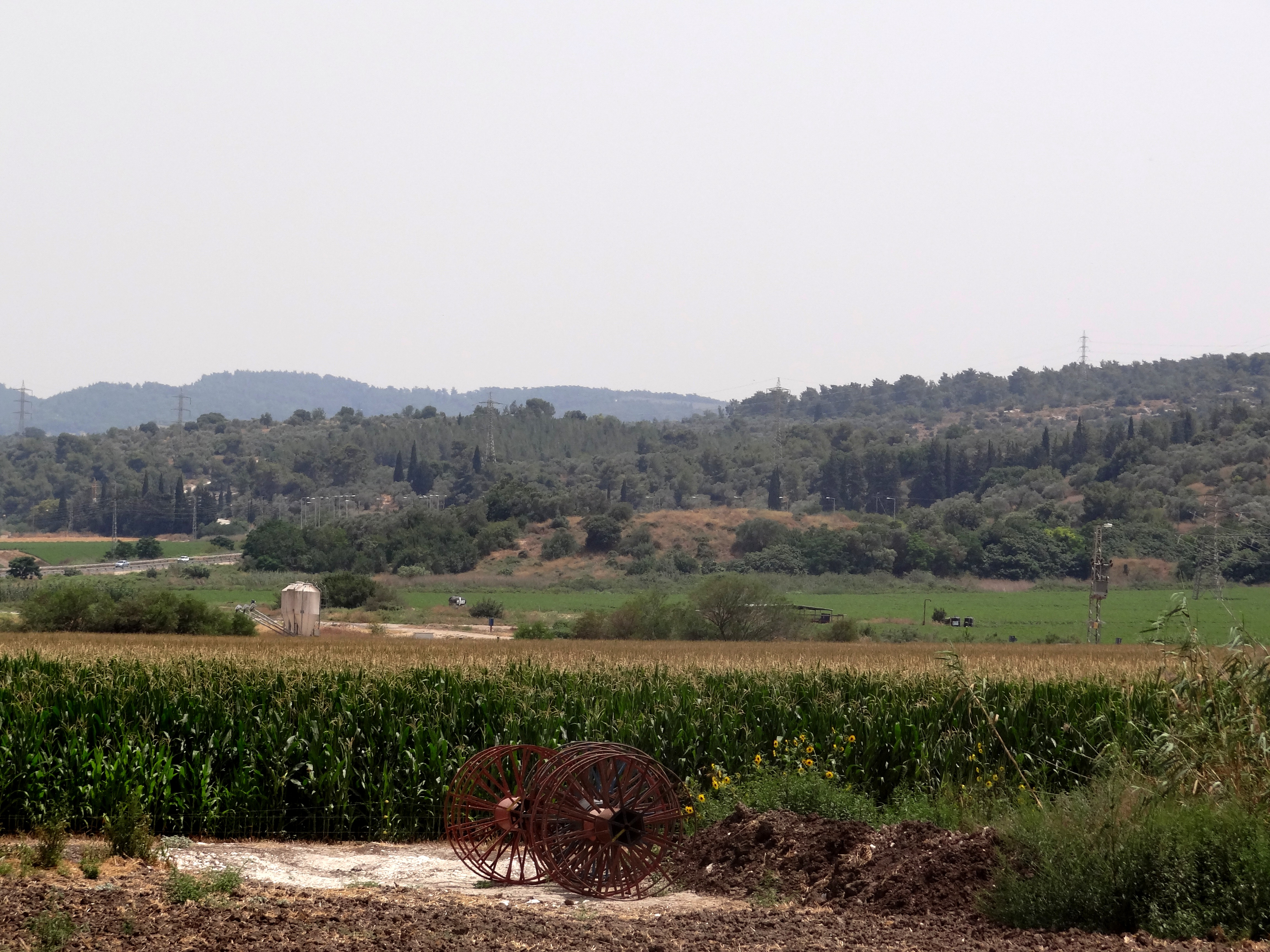 תל זריק אתר ארכאולוגי ליד קיבוץ הזורע בעמק יזרעאל